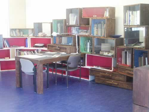 Arnhem, CBK Gelderland, tentoonstelling kunstenaarsboeken